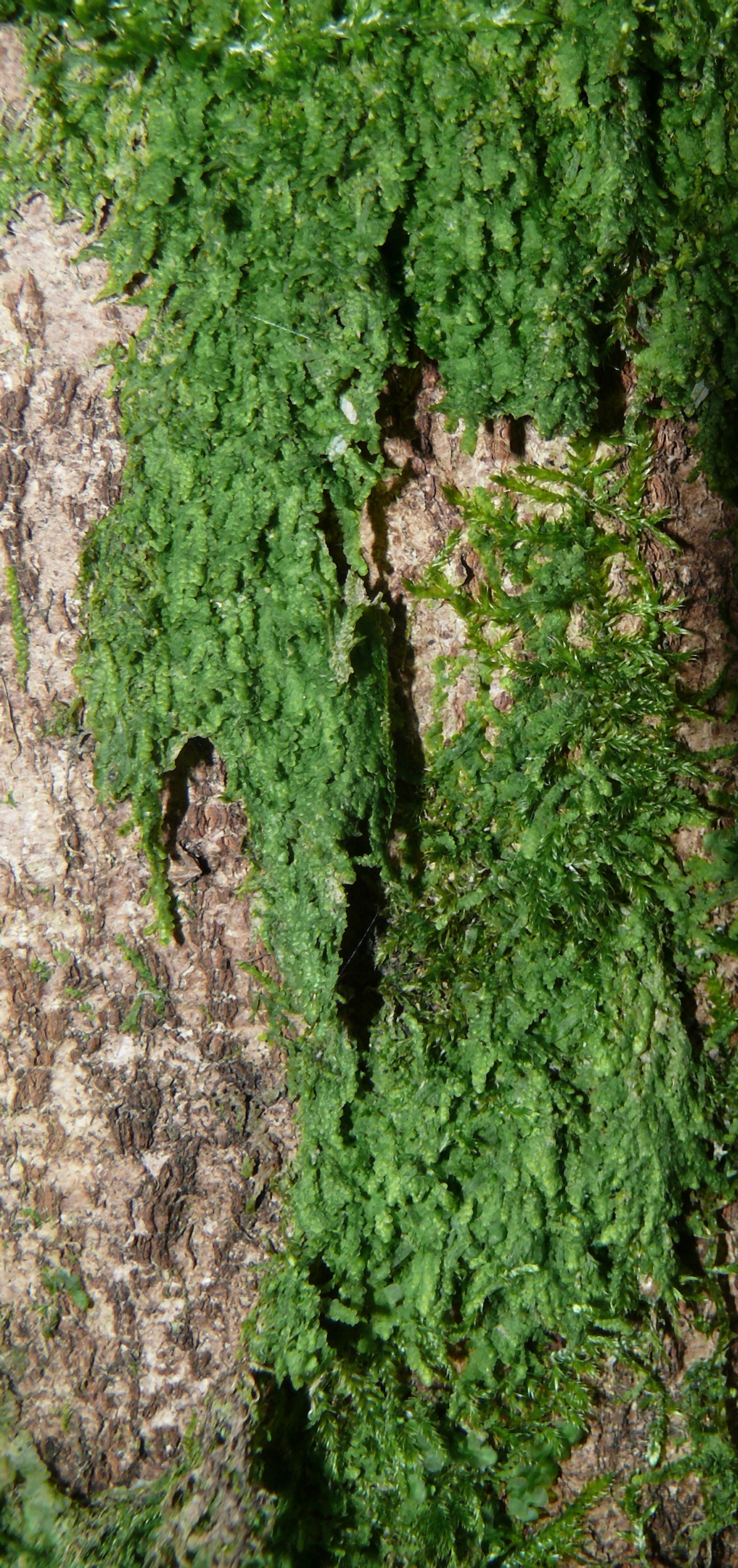 Lejeunea cavifolia, Schwäbisch-Fränkische Waldberge, Germany